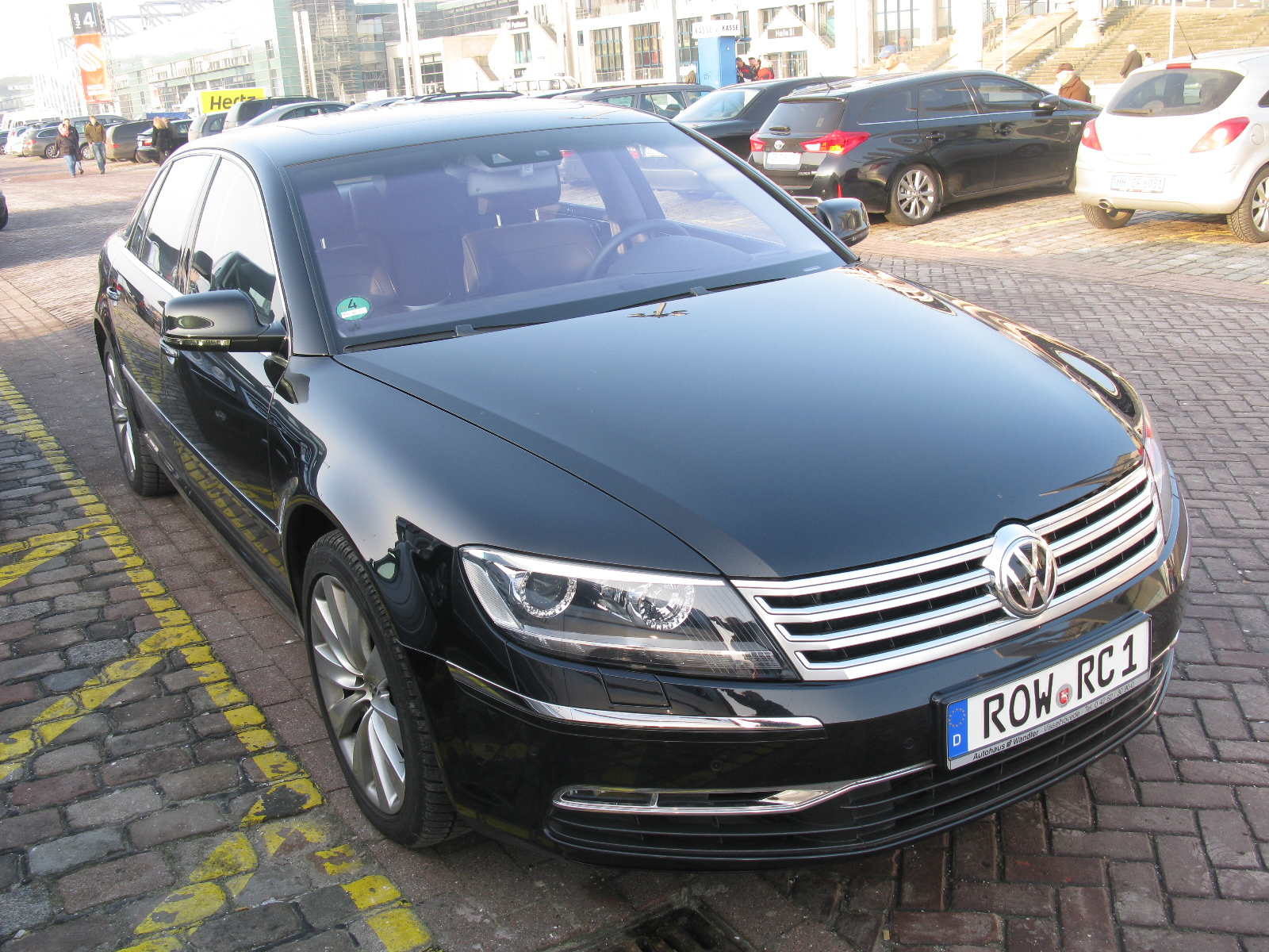 Volkswagen Phaeton 4.2